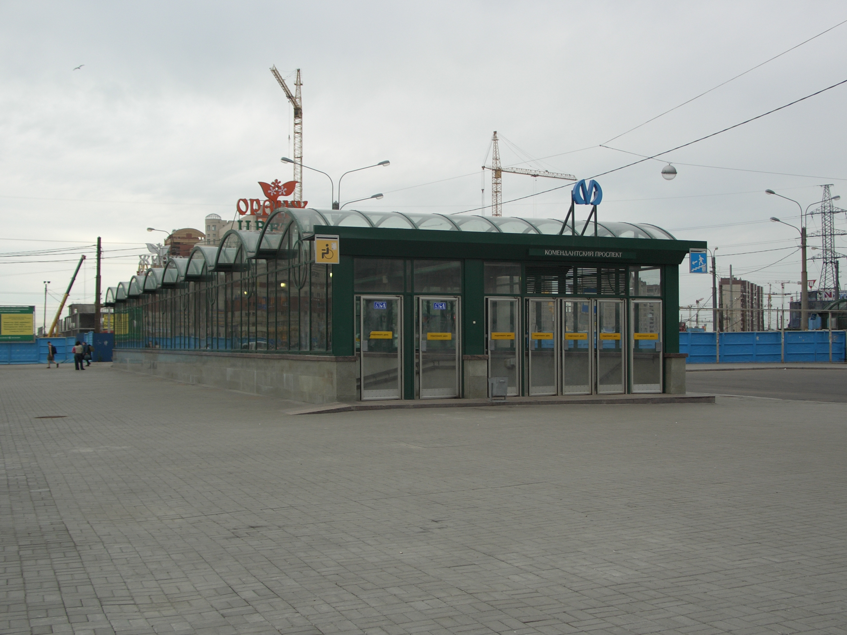 Pavilion metrostation "Komendantsky Prospekt" St Petersburg (Russia)